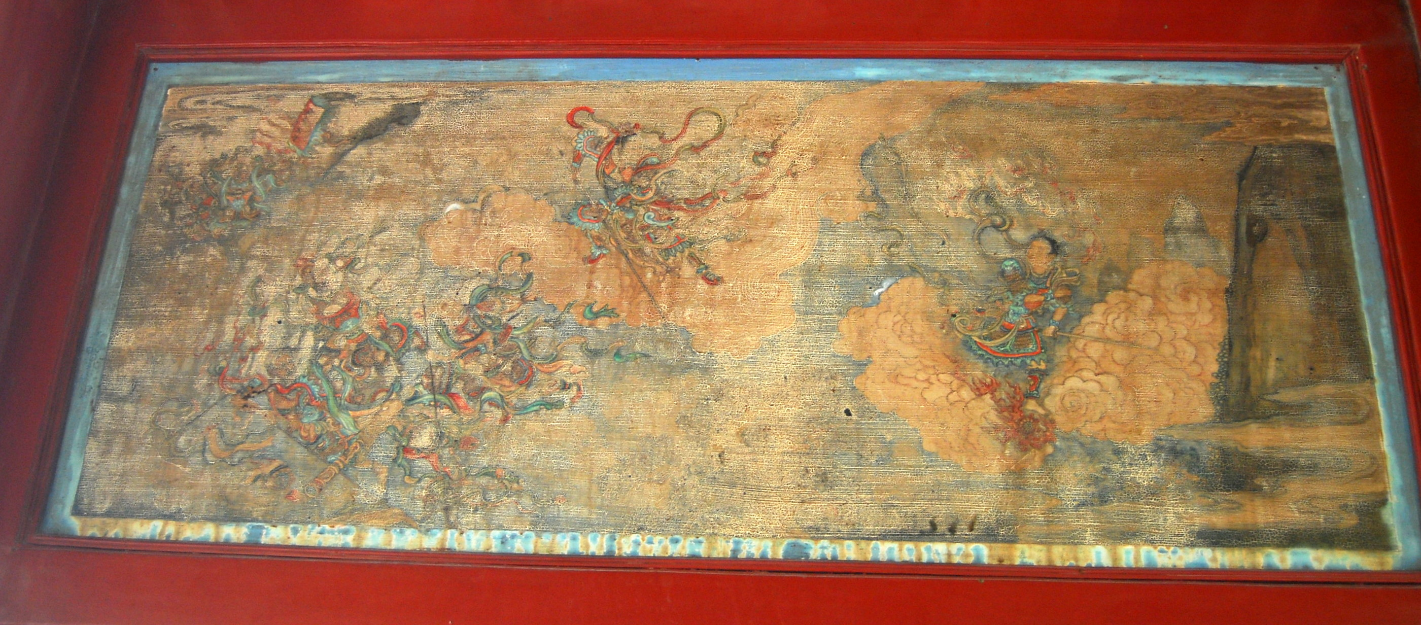 颐和园长廊上的彩绘：西游记情节，大闹天宫中孙悟空大胜哪吒